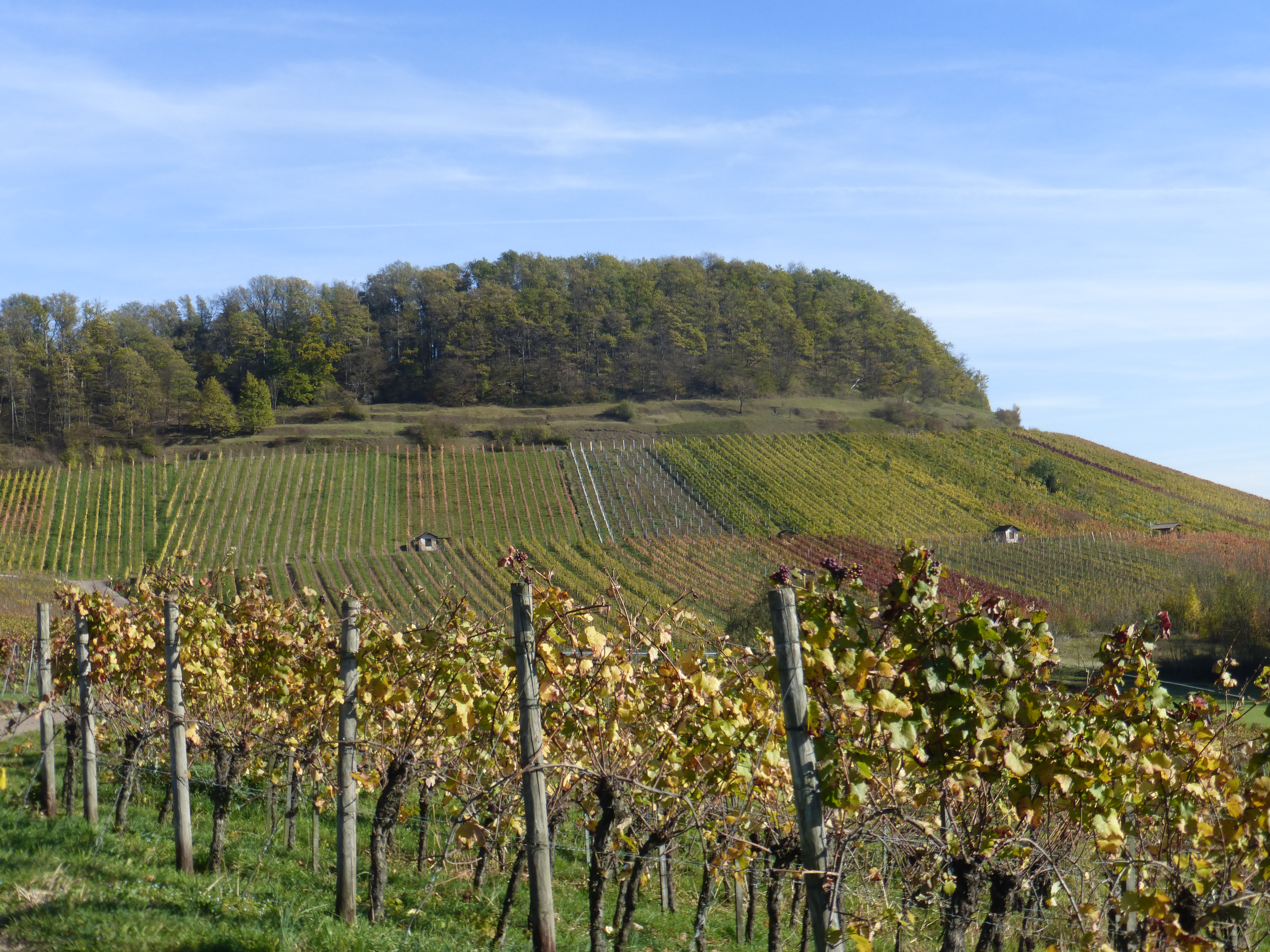 Naturschutzgebiet Diefenbacher Mettenberg, 1. November 2017